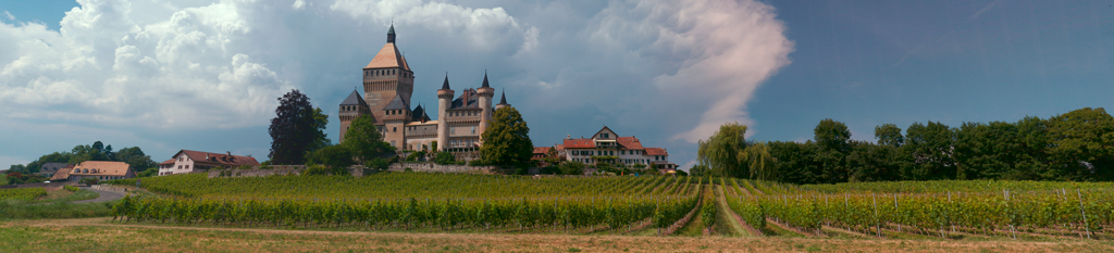 vue de la forteresse de Vufflens depuis....